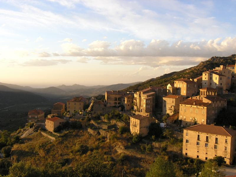 Vue de Lama en Haute-Corse et de la vallée de l'Ostriconi, au coucher du soleil. Septembre 2004. Droits cédés au domaine public par François Darras